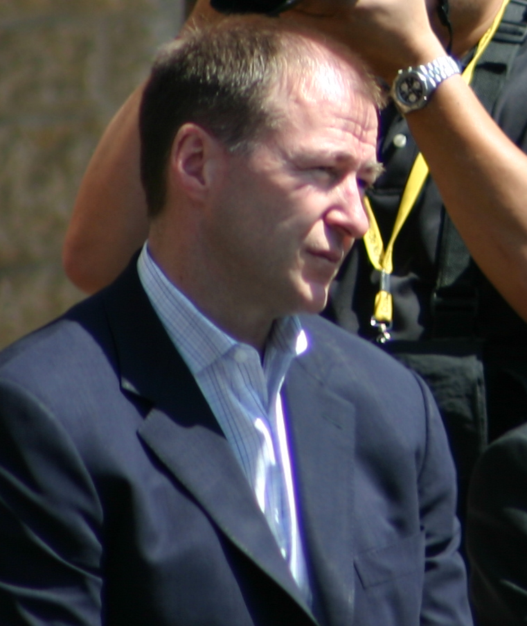 Kevin Lowe in 2006